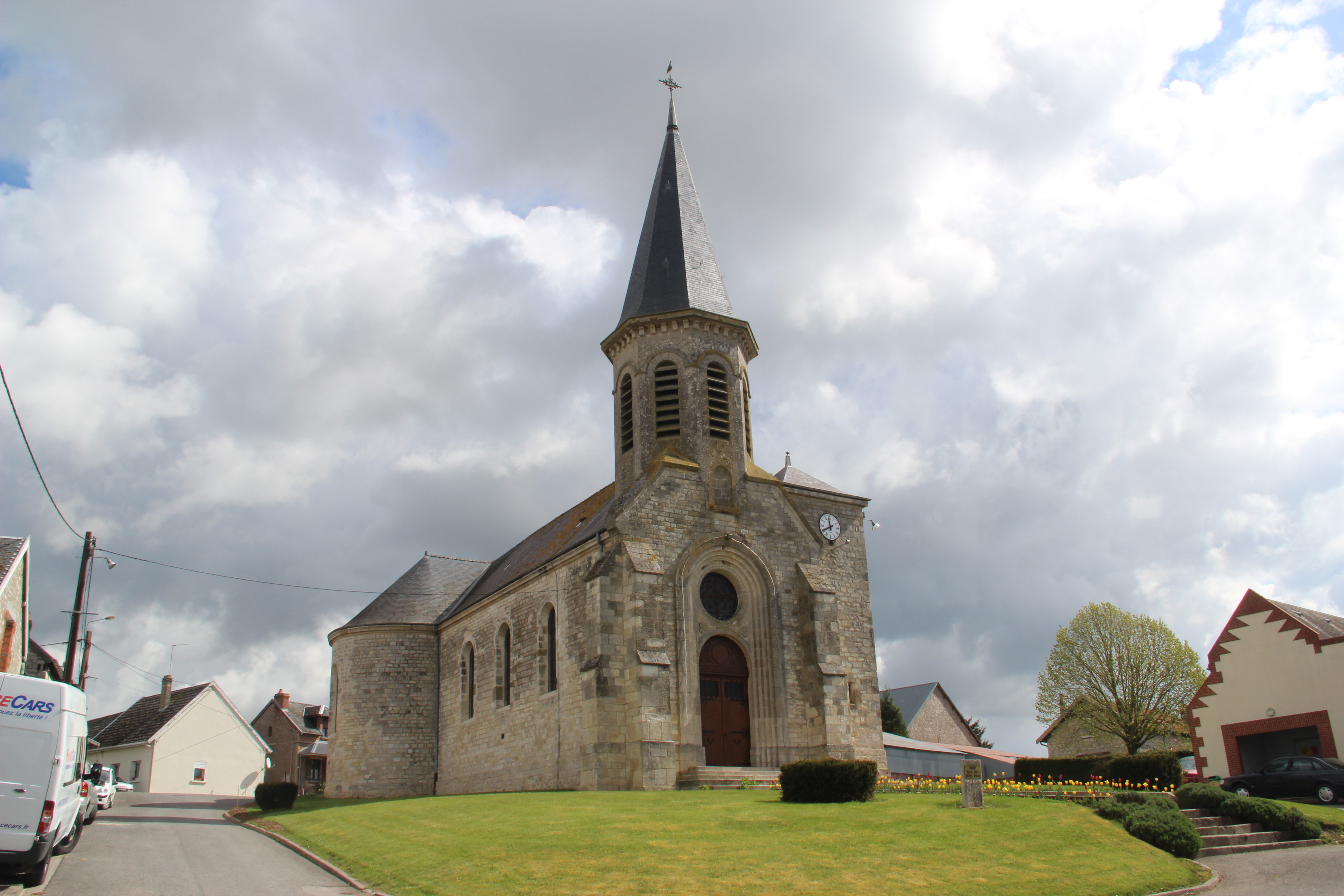 Eglise Saint BEAT (XVIIIe siècle) à Nizy le Comte